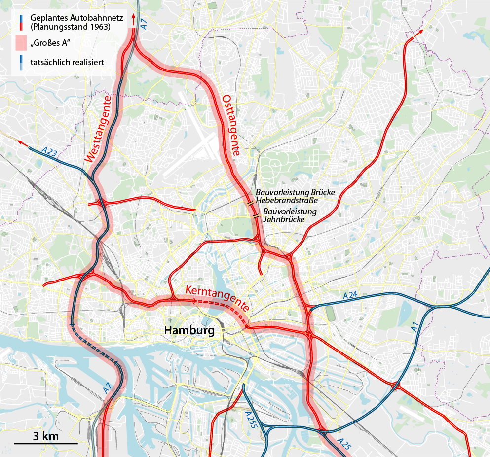 Karte des „Großen A“, Planung eines Stadtautobahnnetzes für Hamburg in den 1960er-Jahren